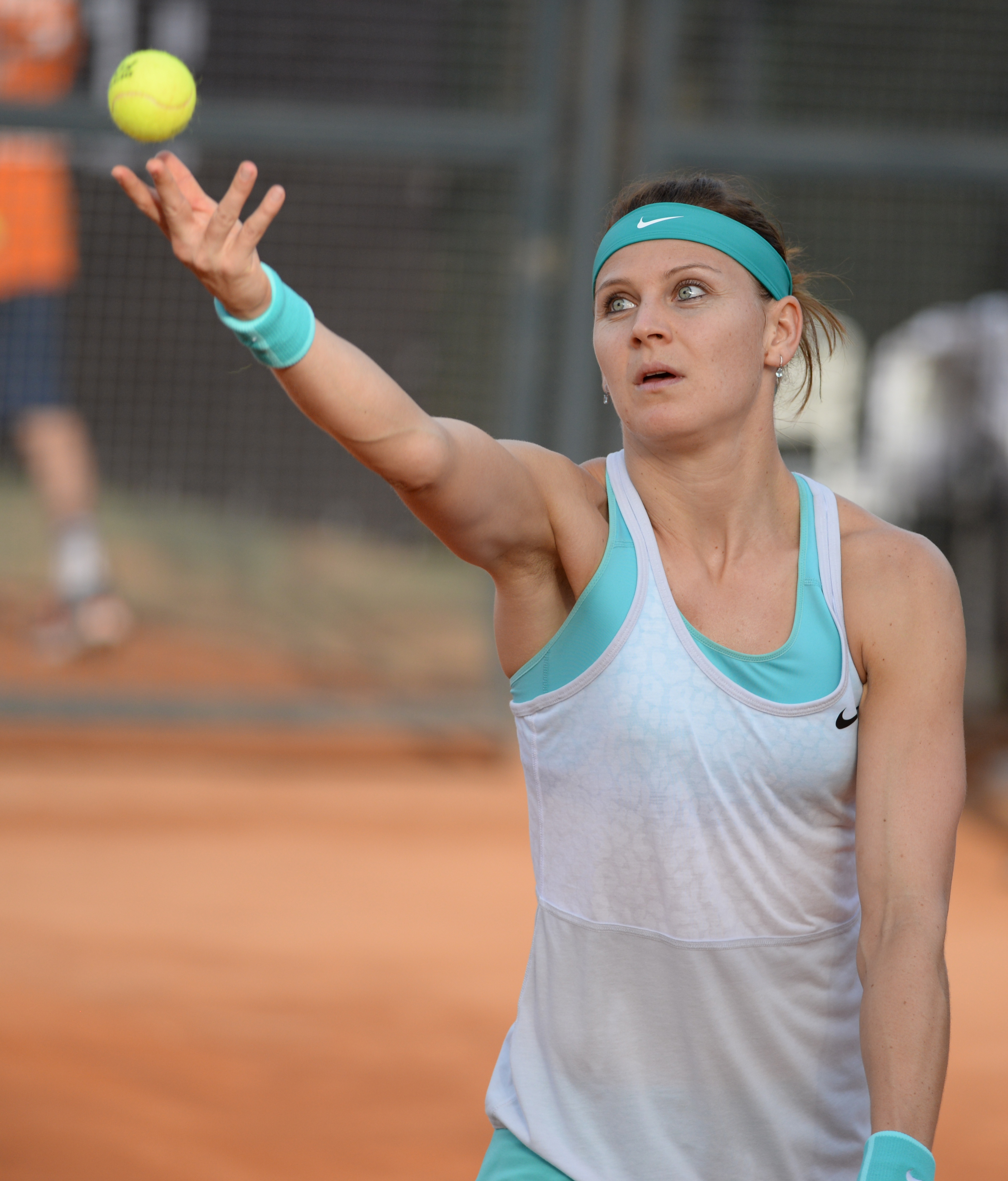 Lucie Safarova